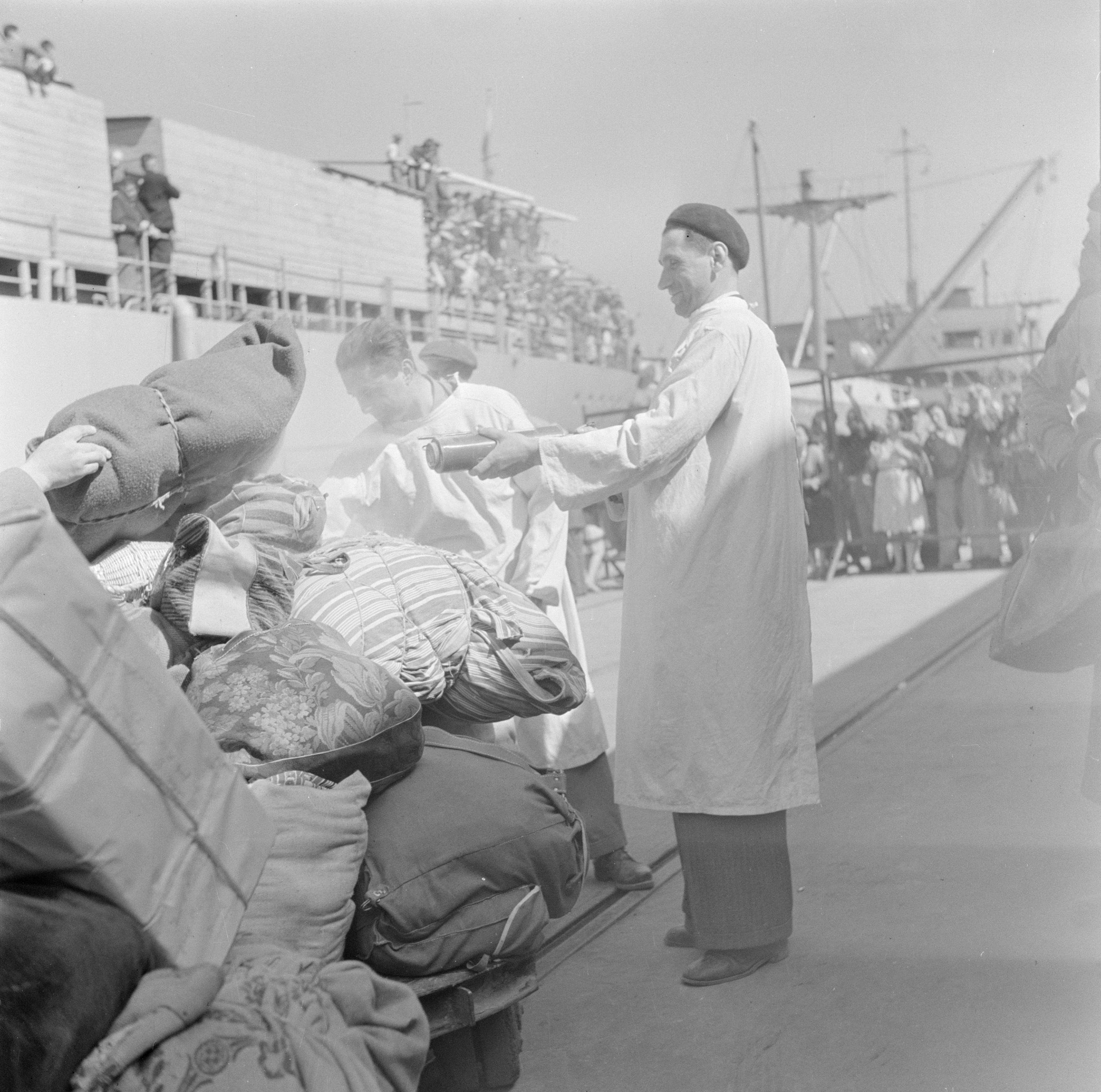 Collectie / Archief : Fotocollectie Van de Poll Reportage / Serie : Israel 1948-1949 Beschrijving : In de haven van Haifa wordt de bagage van de emigranten (oliem) van boord van het transportschip Bulgaria gehaald en dadelijk met DDT ontsmet door mannen in witte jassen Datum : 1948 Locatie : Haifa, Israël Trefwoorden : bagage, emigranten, havenpersoneel, havens, ontsmettingen, scheepvaart, vervoermiddelen Fotograaf : Poll, Willem van de, [onbekend] Auteursrechthebbende : Nationaal Archief Materiaalsoort : Negatief (zwart/wit) Nummer archiefinventaris : bekijk toegang 2.24.14.02 Bestanddeelnummer : 255-1136